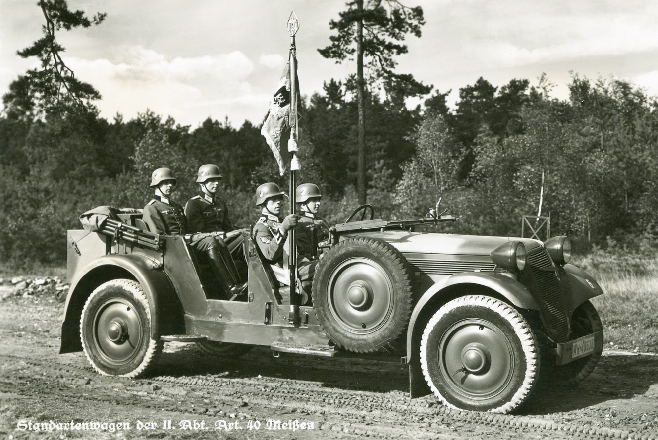 Meißen; Standartenwagen der II. Abteilung Artillerie-Regiment Nr. 40 This postcard is from publisher Brück & Sohn in Meißen ( postcard has a unique number 27083 and is available in a higher resolution at the publisher. This images was uploaded in a cooperation project between Wikipedians and the publisher.